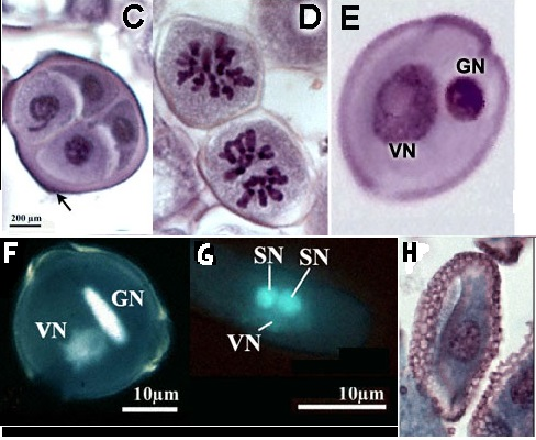 C- Tetrade di microspore D-Prima divisione mitotica per la formazione del granulo polline binucleato E- Nucleo vegetativo o del tubetto (VN) e nucleo generativo (GN) prima della seconda divisione mitotica F- Polline di tabacco in procinto di effettuare la seconda divisione mitotica del nucleo generativo G-Polline di Tabacco con i due nuclei generativi (SN) e il nucleo vegetativo o del tubetto (VN) H- Polline maturo, si noti al centro il nucleo vegetativo